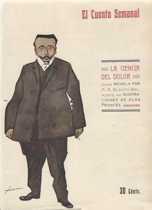 Portada de La ciencia del dolor.